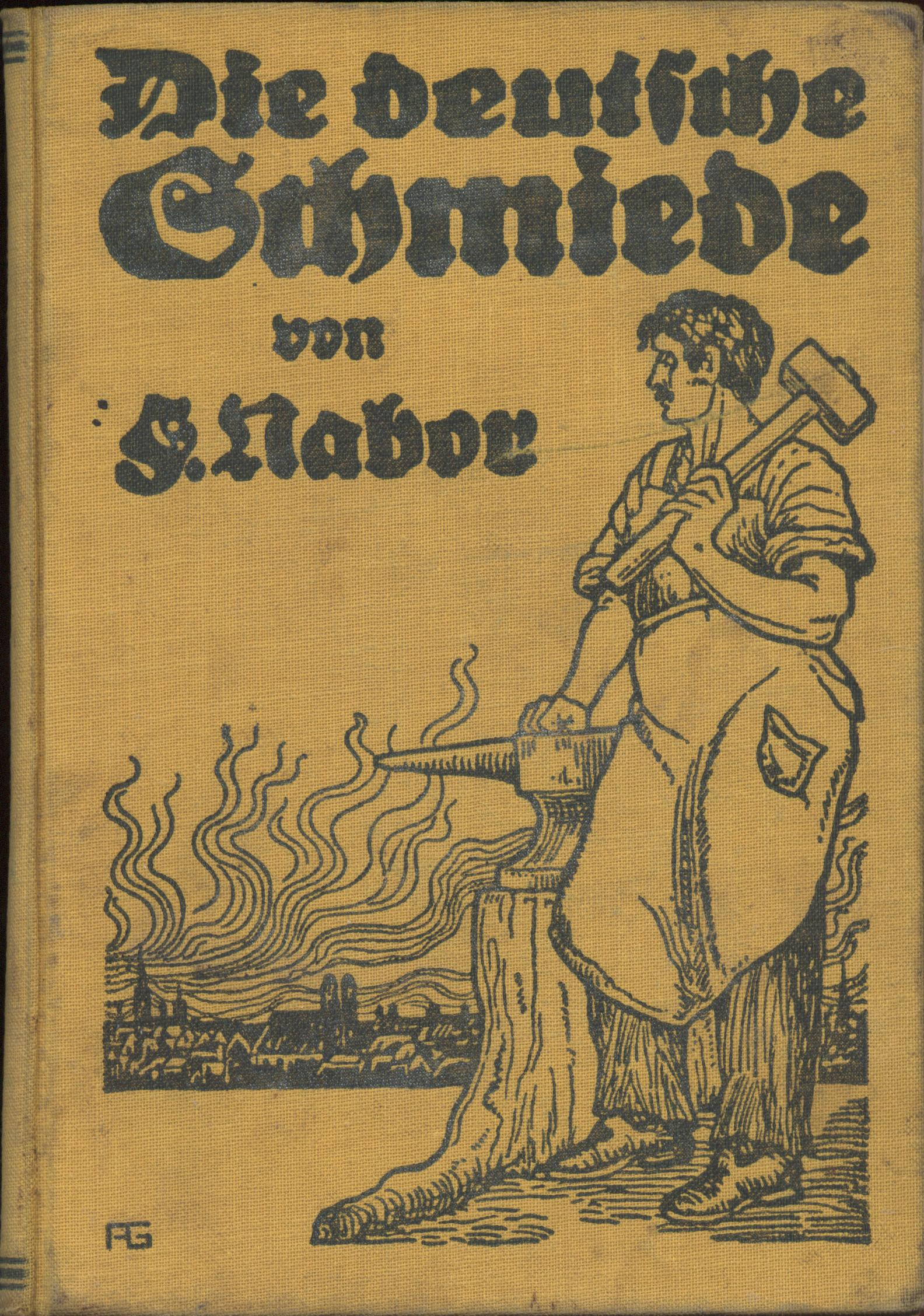 Felix Nabor (=Karl Allmendinger), Schriftsteller, Buchtitel